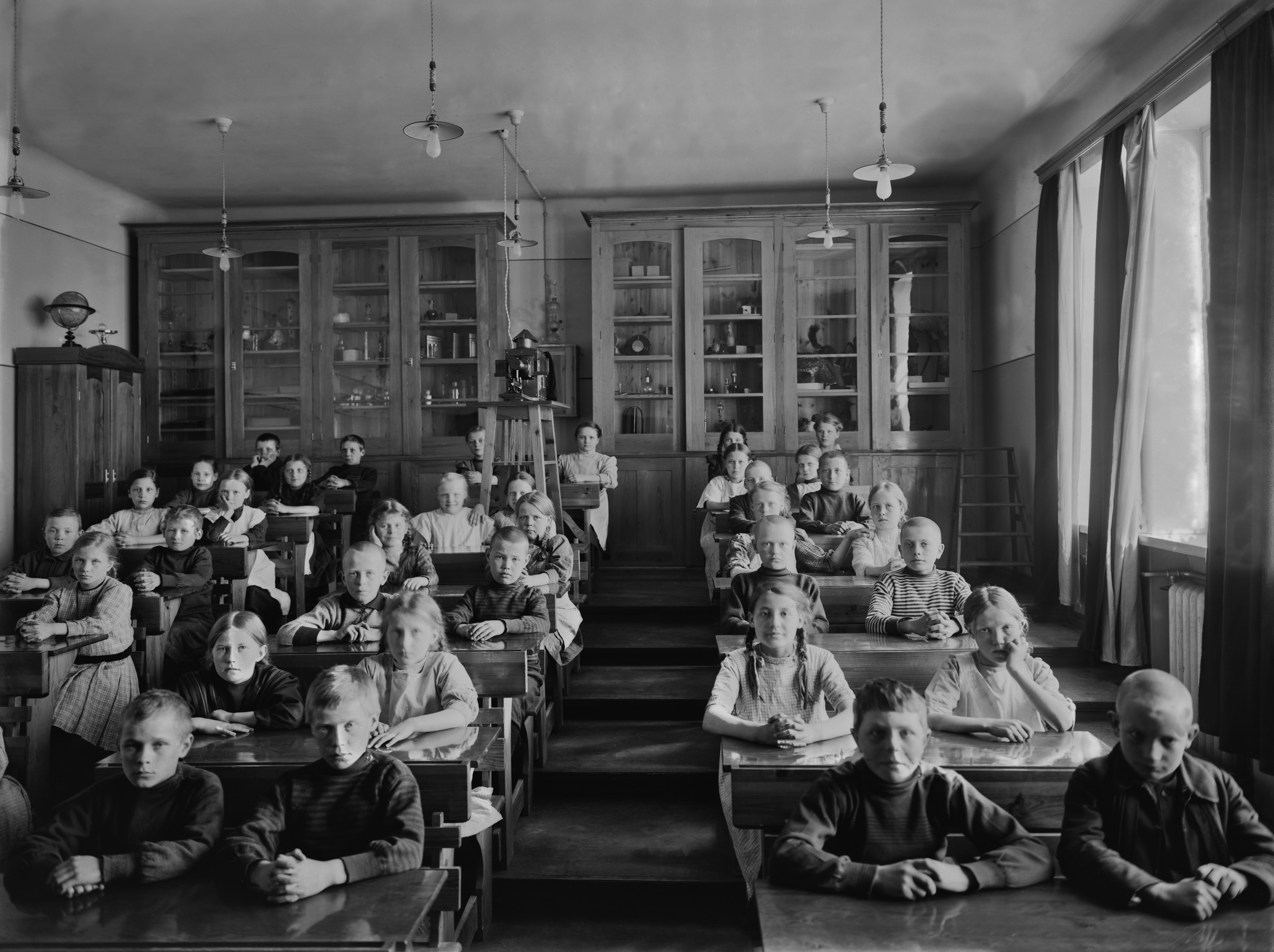 Kallion kansakoulu, Neljäs linja 15. Luokkahuone, luonnontieteen luokka.; negatiivi ja vedos, lasi paperi pahvi, mv